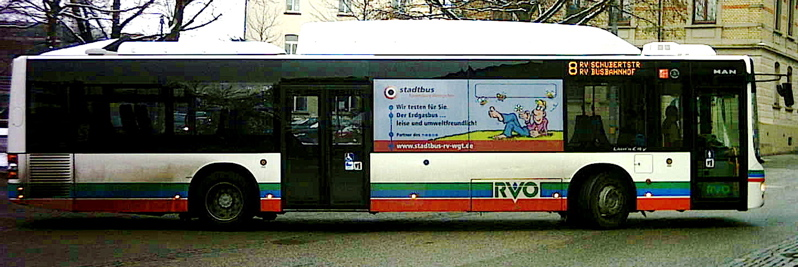 Erdgasbus der RVO zum Test in Ravensburg Dezember 2005. Auf dem Dach unter der Erhöhung befinden sich die Erdgastanks.